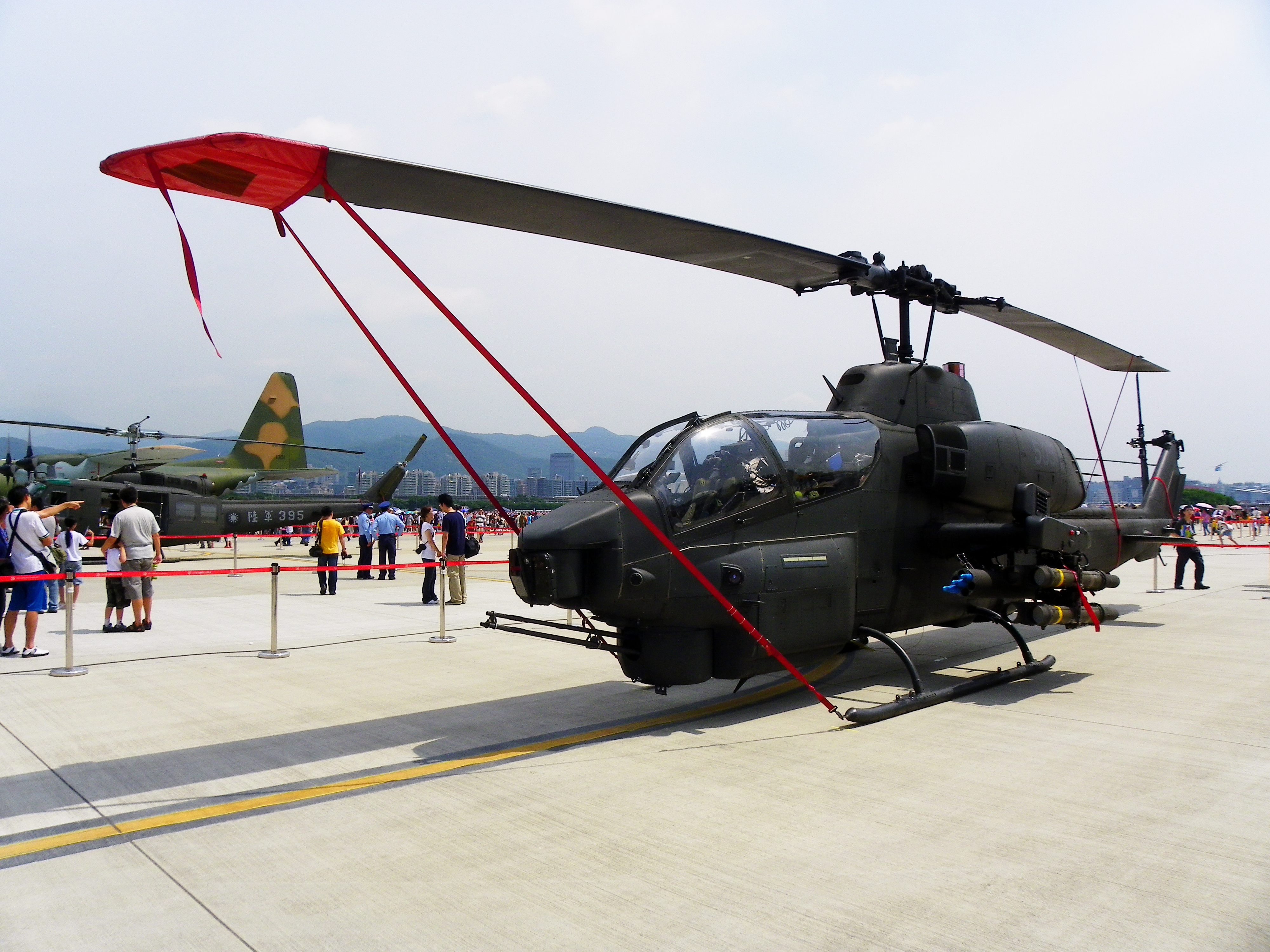 參加空軍松山基地營區開放活動的陸軍AH-1W攻擊直昇機。